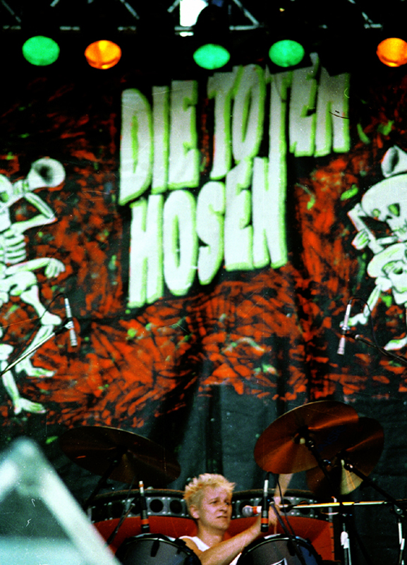 Wolfgang Rohde, Schlagzeuger der Toten Hosen, bei einem Konzert 1987 in Garching bei München.